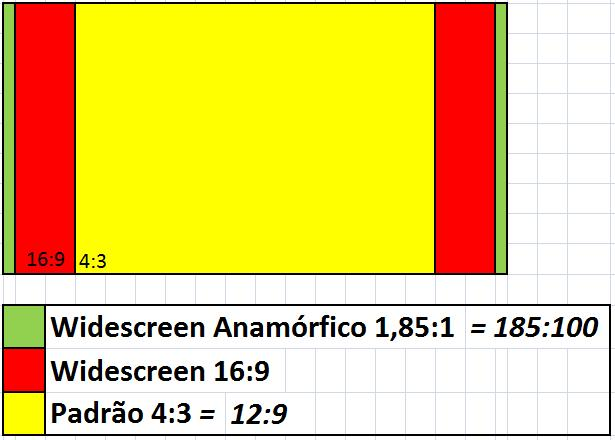 Formatos de tela proporcionalmente exibidos.